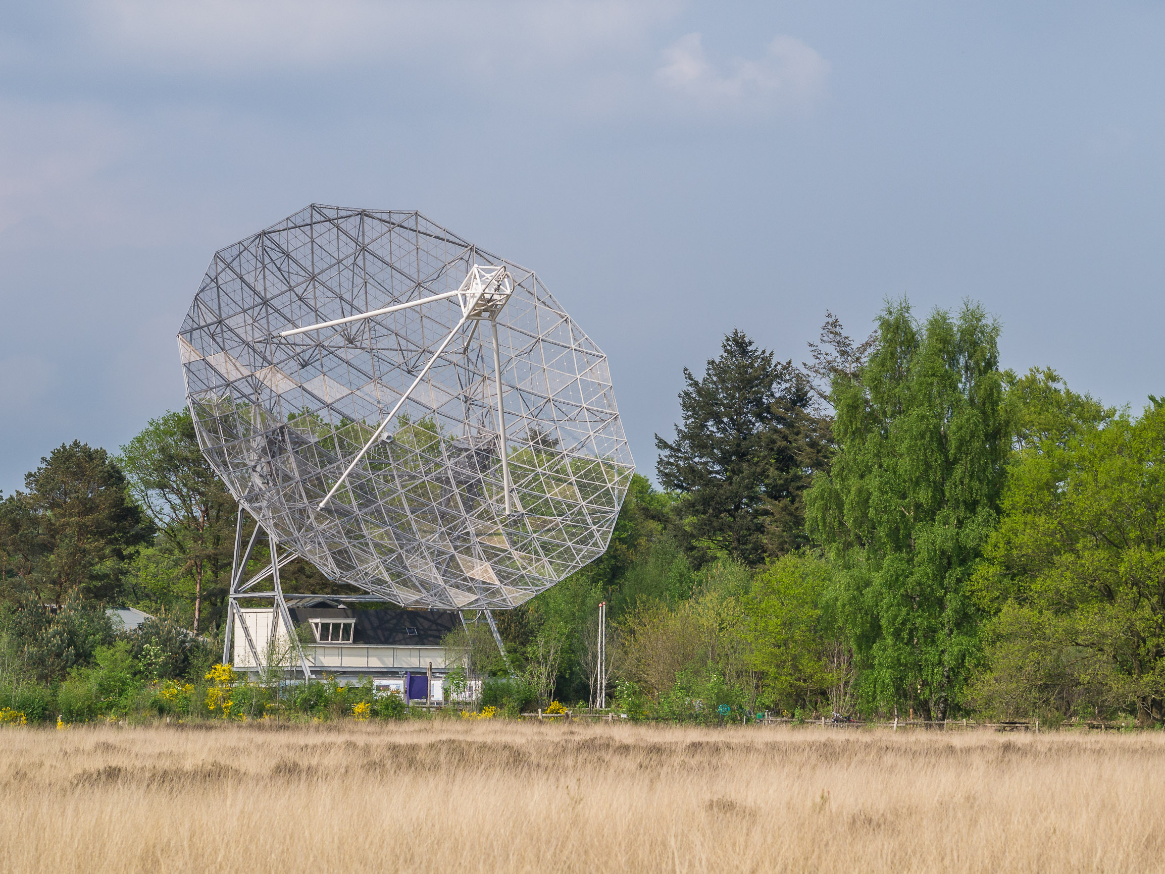 Radiotelescoop op de Heide van het Dwingelderveld This is a photo or sound file made in Dwingelderveld National Park in the Netherlands, with the main subject of the file in the category: humans in nature